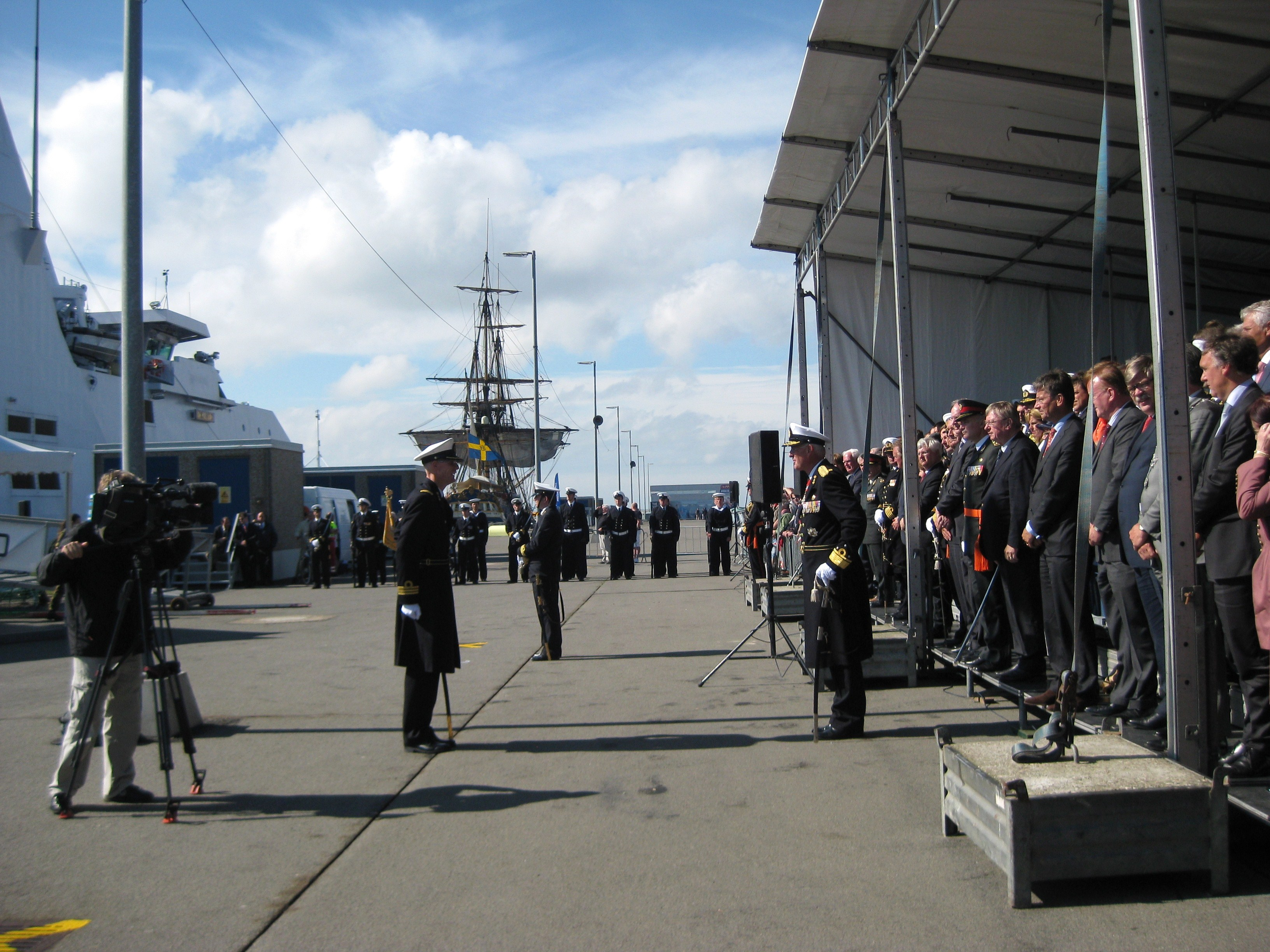 Ceremonie bij de in dienst stelling van de Hr.Ms.Holland op 6 juli 2012